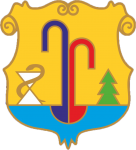 Герб села Поляна (Свалявський район)